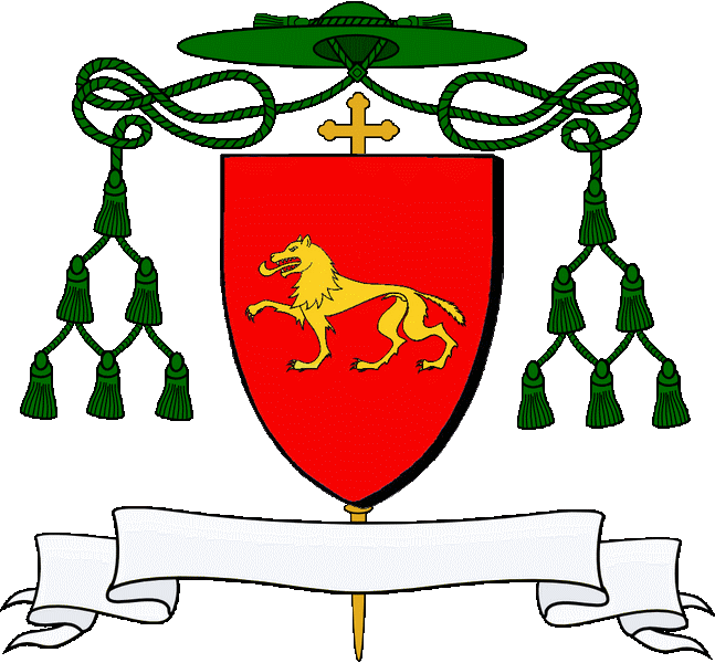 En gwad e vleiz tremenant en aour